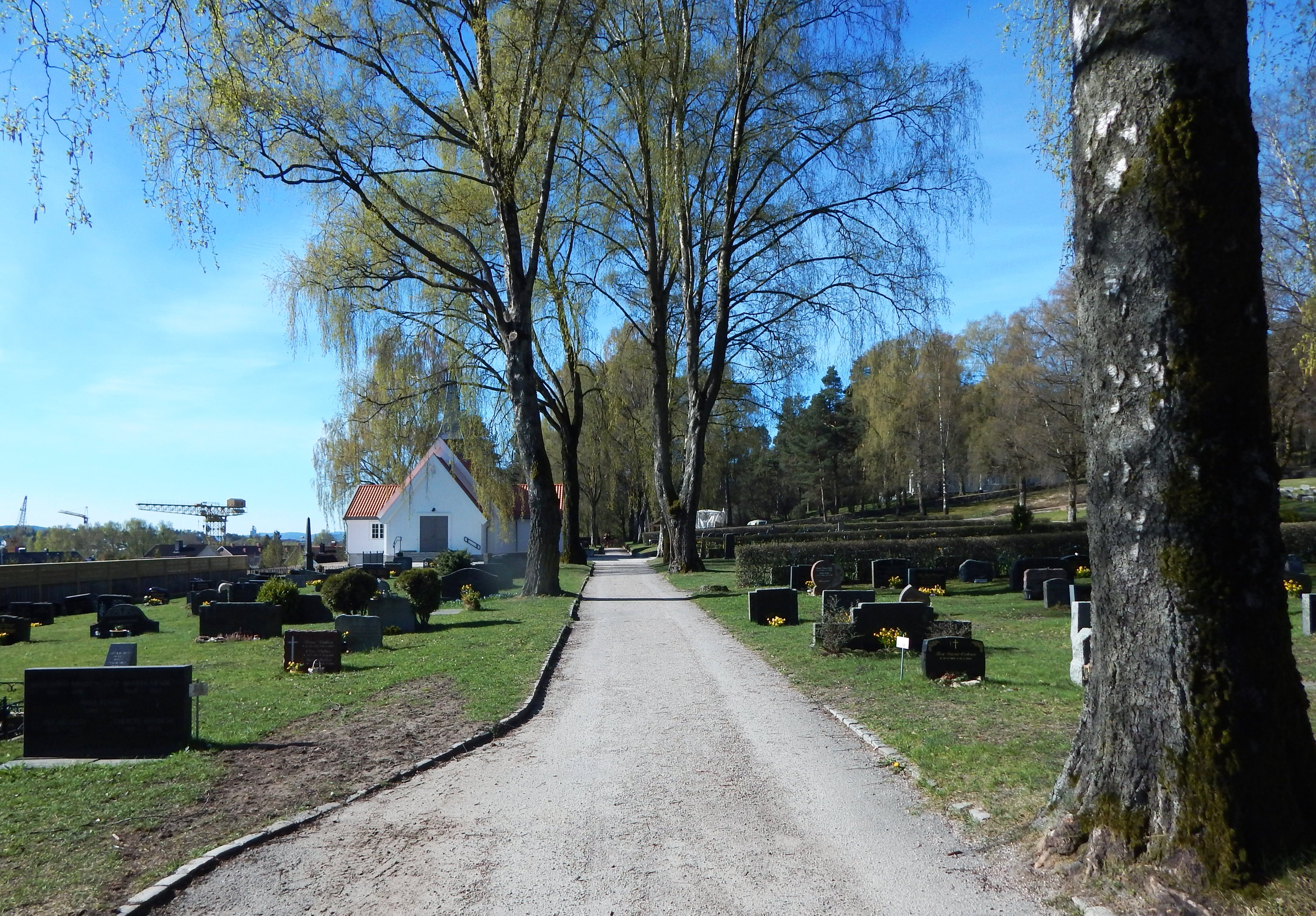 Tørmo kirkegård på Vestsiden i Porsgrunn